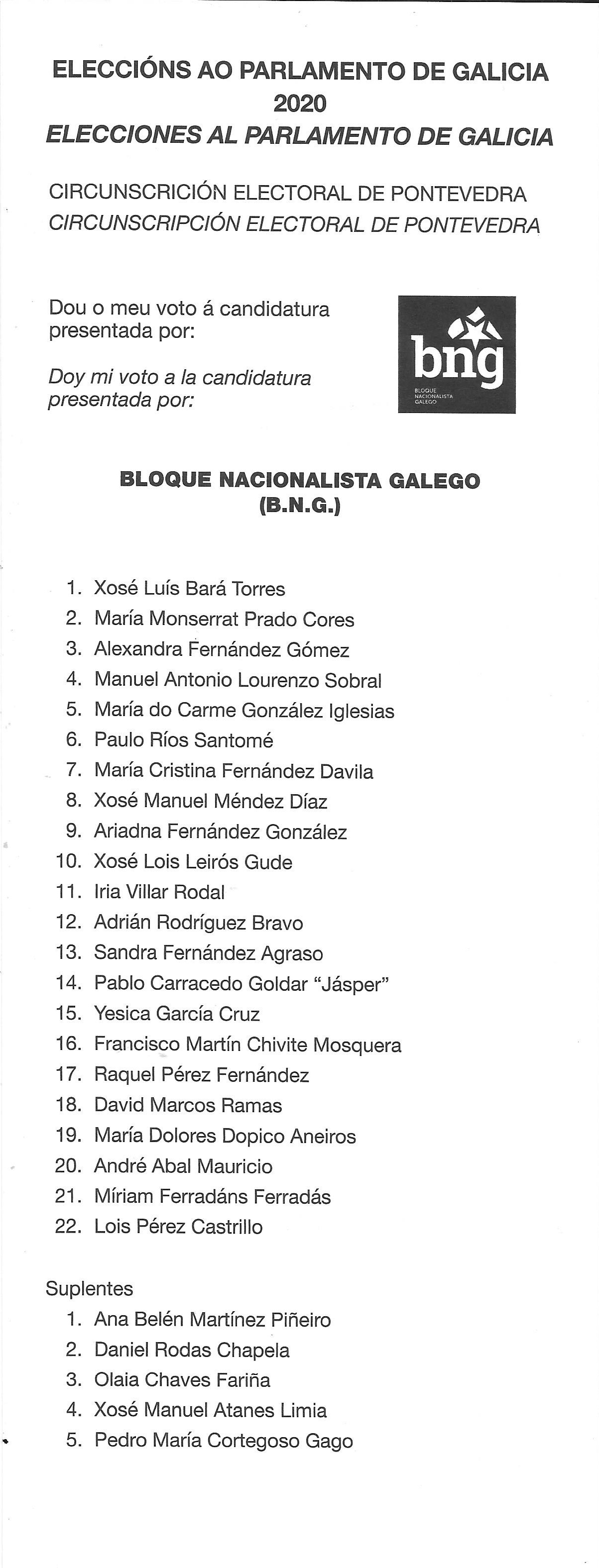 Papeletas electorais Eleccións ao Parlamento de Galicia 2020 pospostas circunscrición electoral de Pontevedra-BNG.